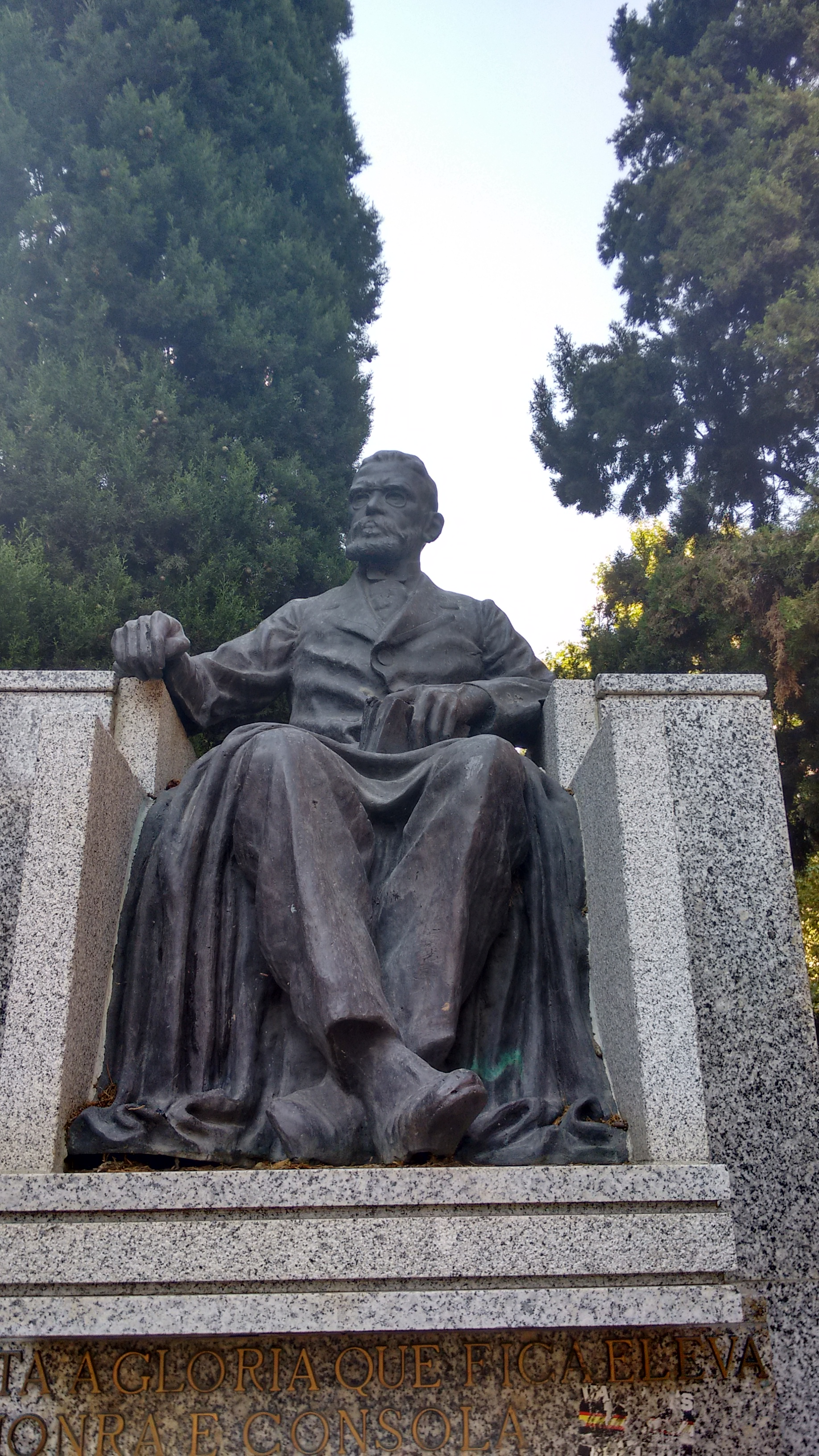 Estatua de Machado de Assis